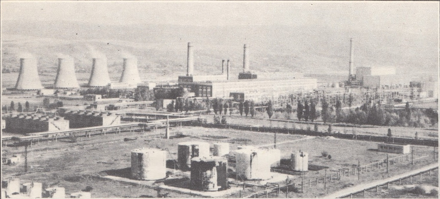 Mapă-pliant: Municipiul Gheorghe Gheorghiu-Dej (1976)